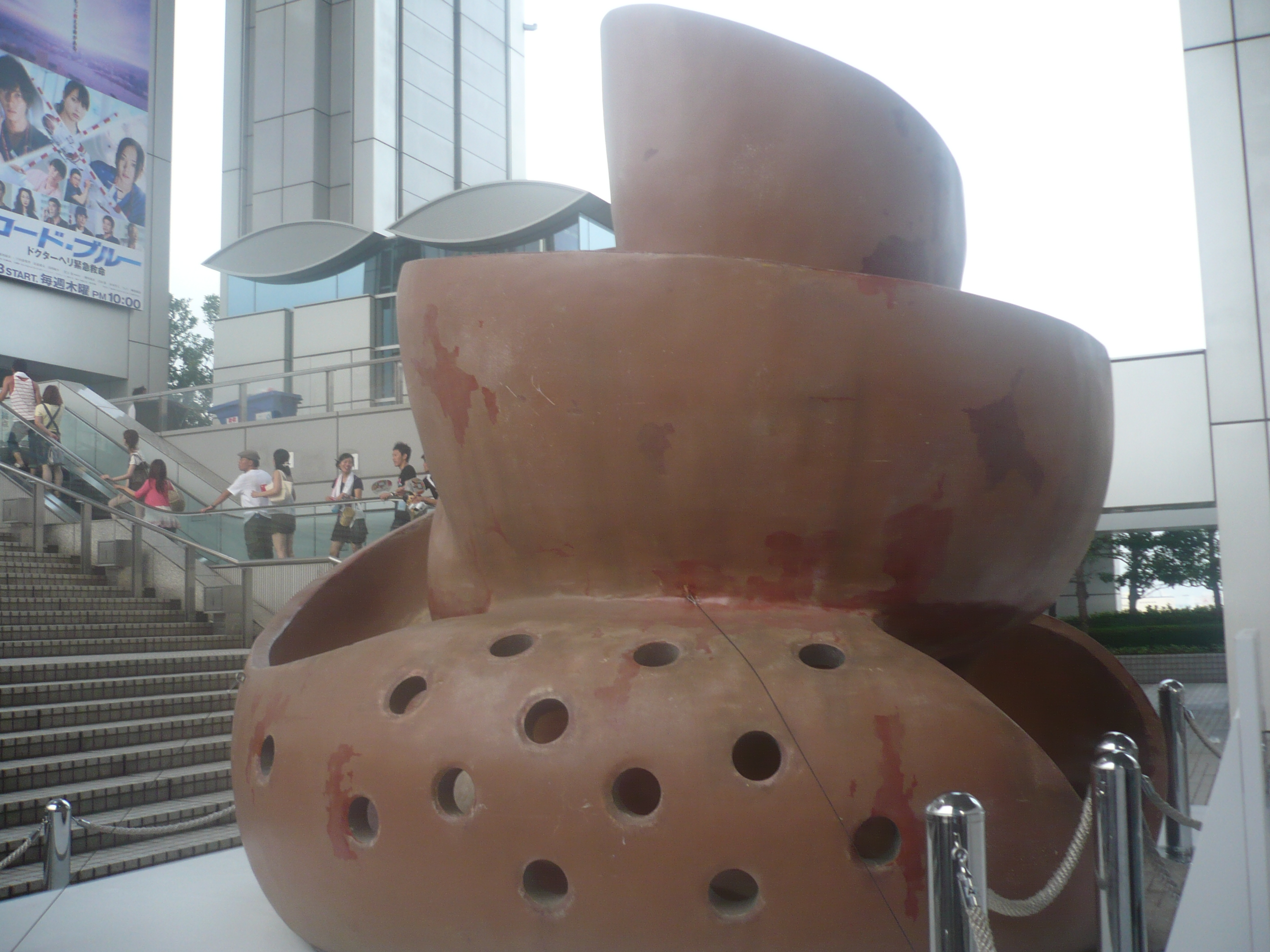 フジテレビ本社に展示されていた、まき糞の形をしたすべり台。